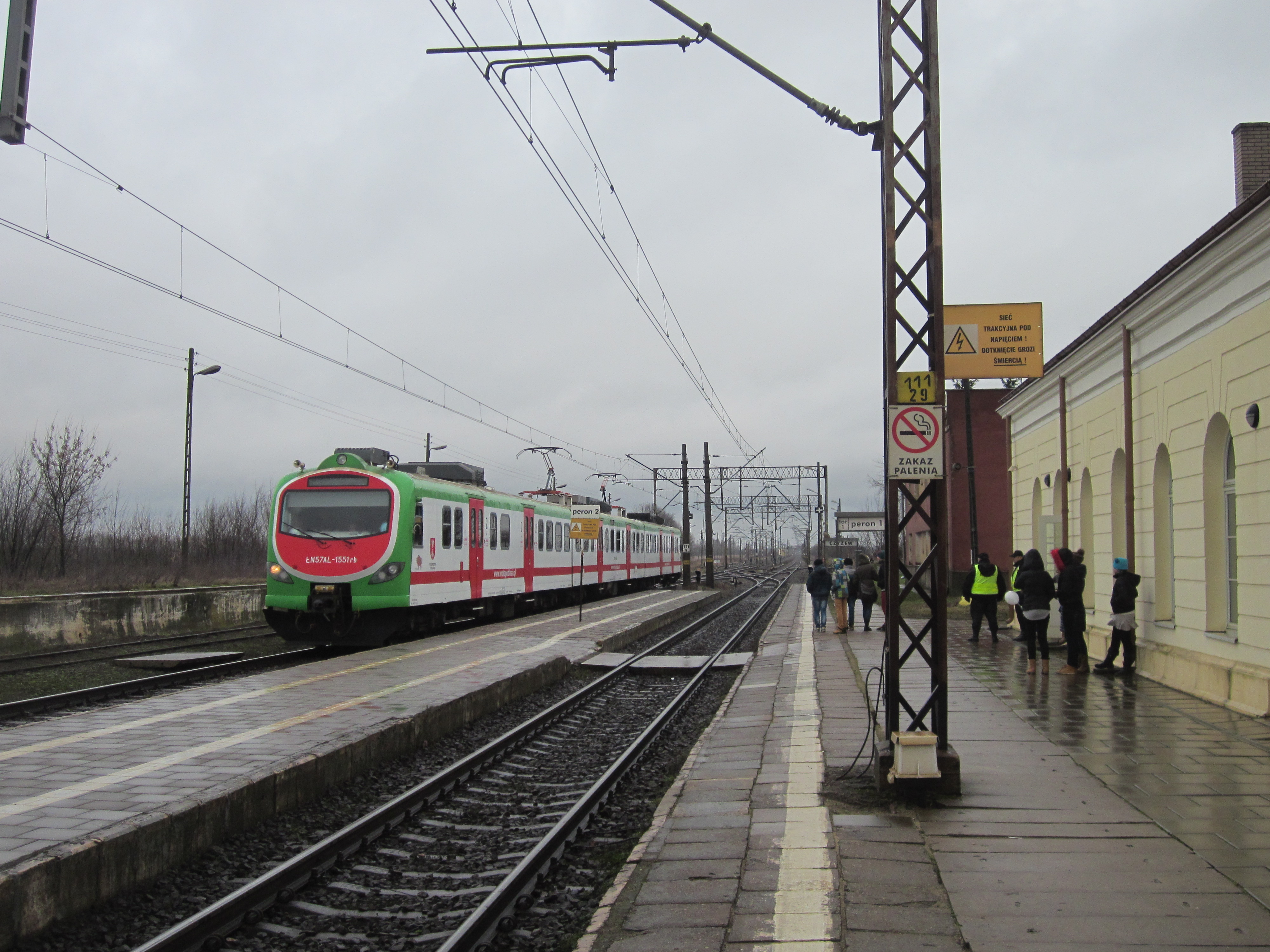 Zdjęcie zostało zrobione 12 stycznia 2014 roku podczas 22 finału WOŚP – przejazd specjalnym pociągiem WOŚP na trasie Szepietowo – Czyżew – Małkinia – Czyżew – Szepietowo.